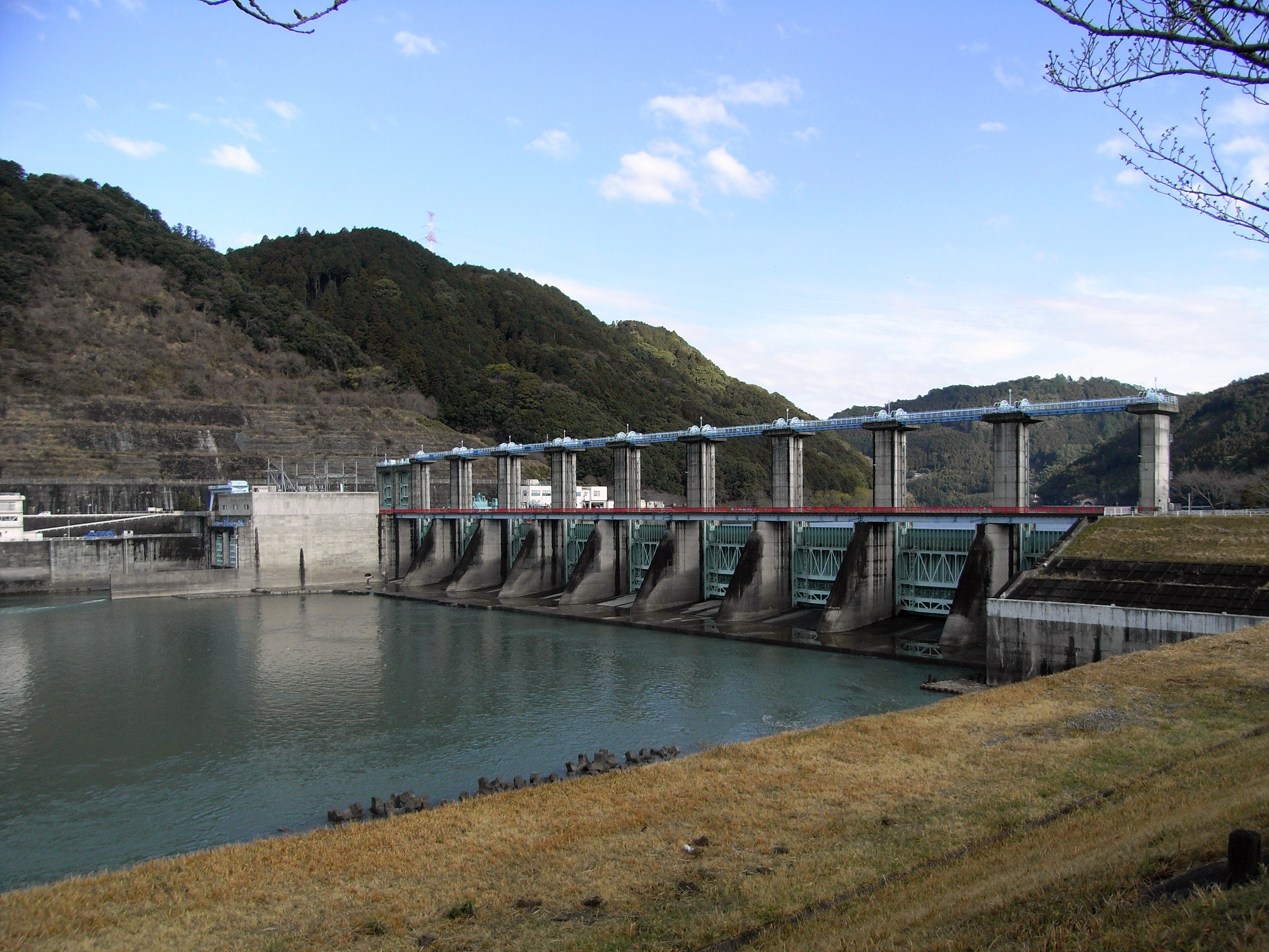 Dam